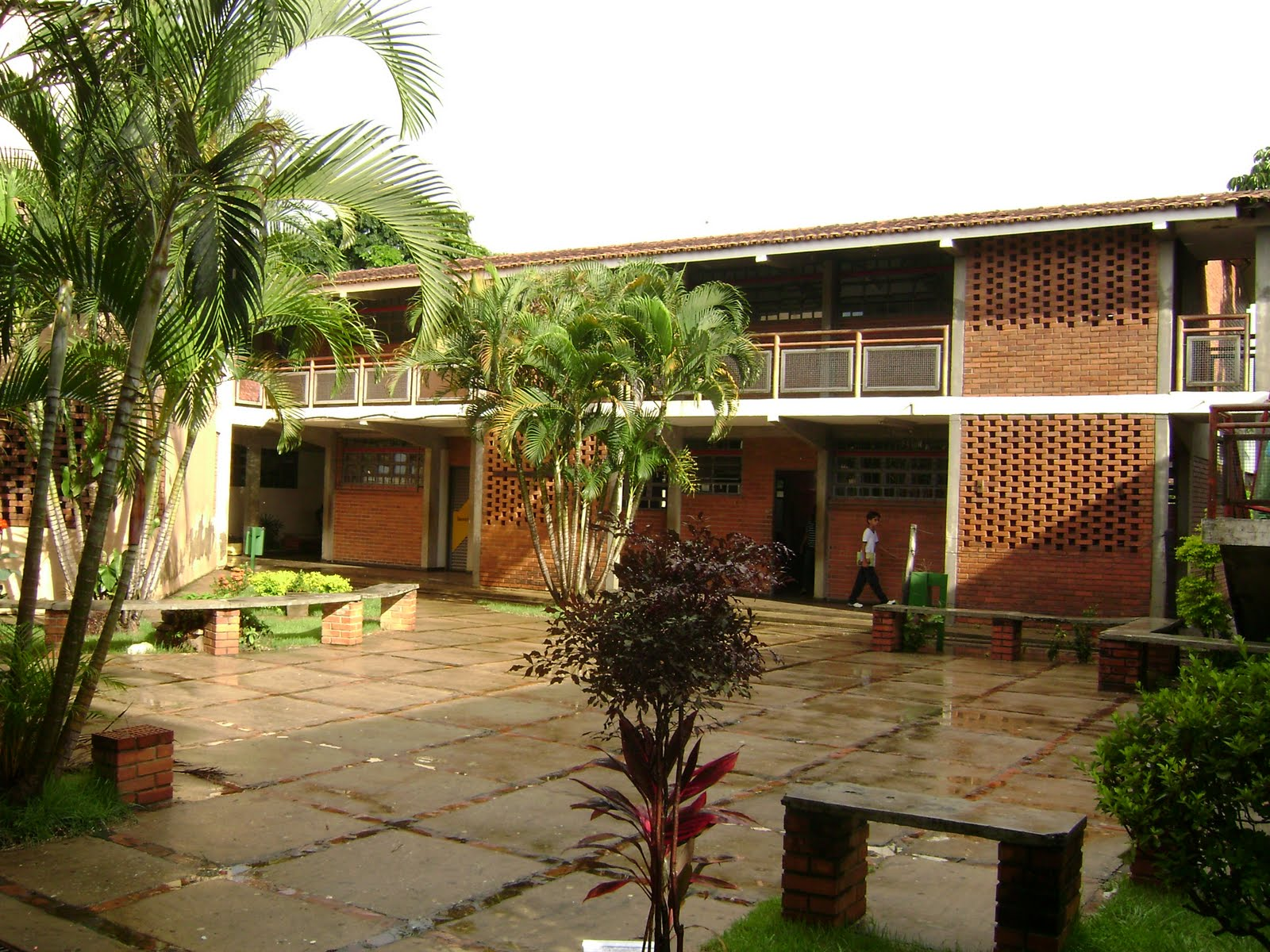 Pavilhão Desportivo Prof. Manuel Farraz, Parchal